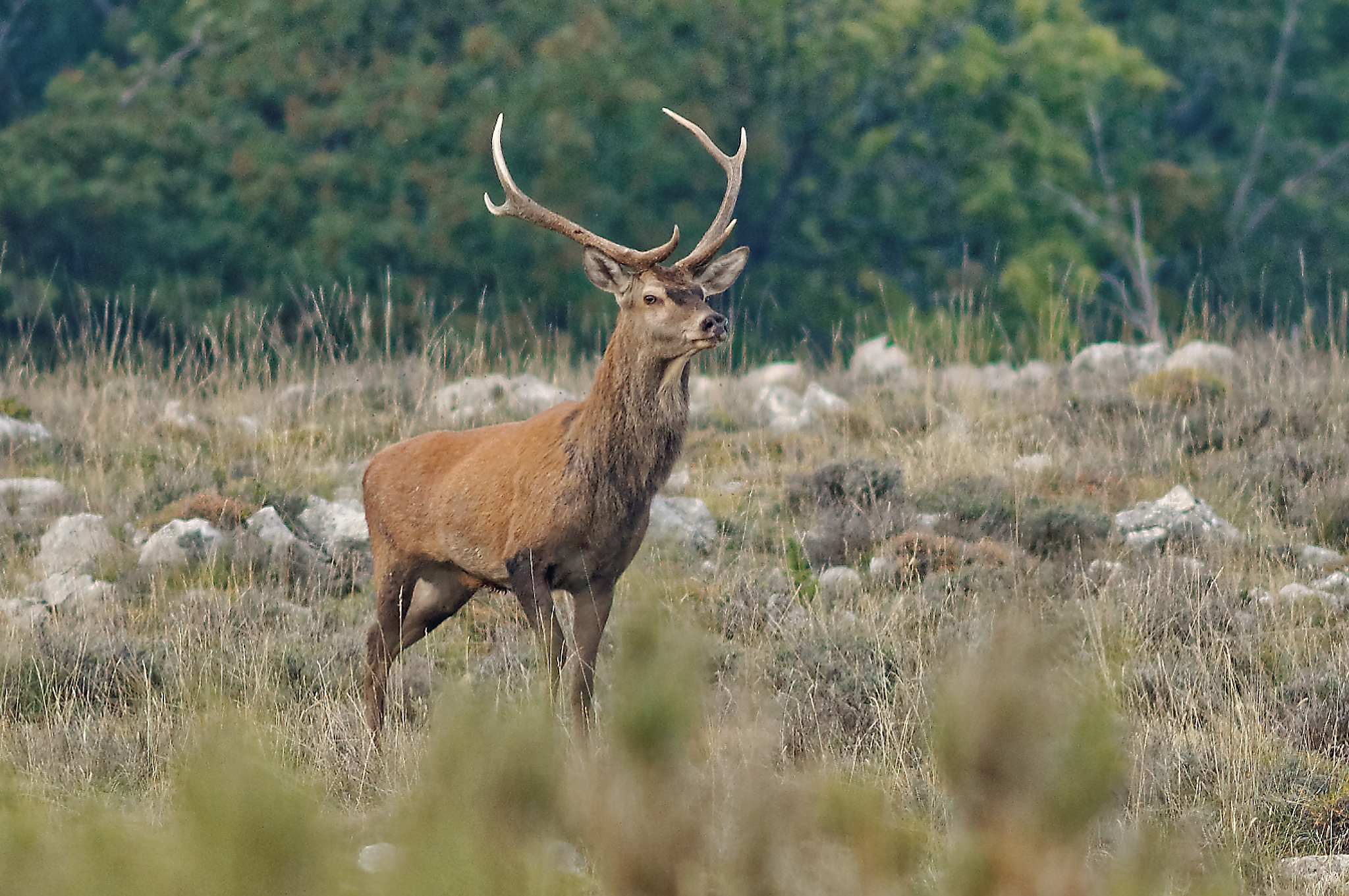 Cerf à Bramafan